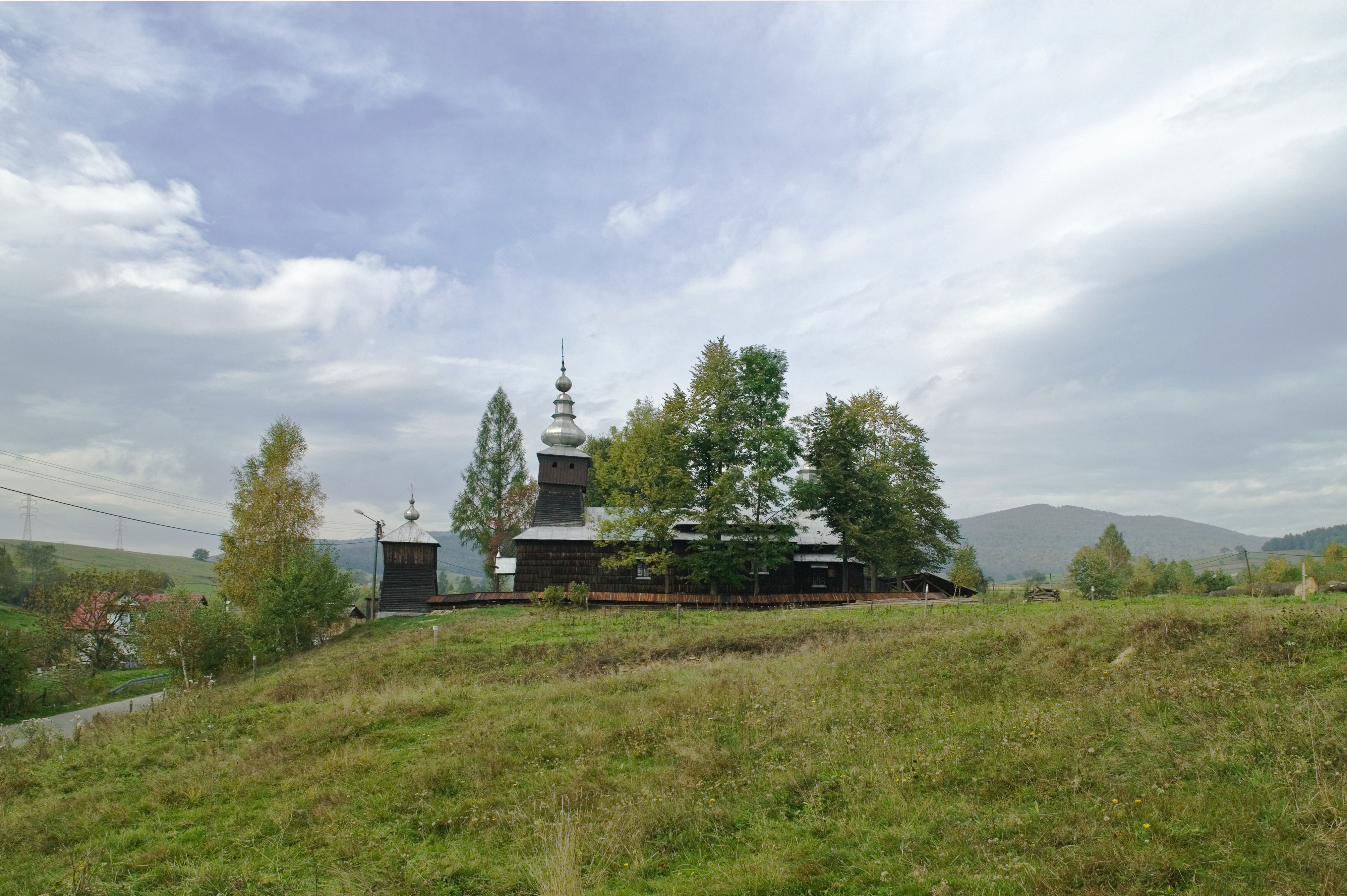 Jastrzębik, cerkiew greckokatolicka św. Łukasza